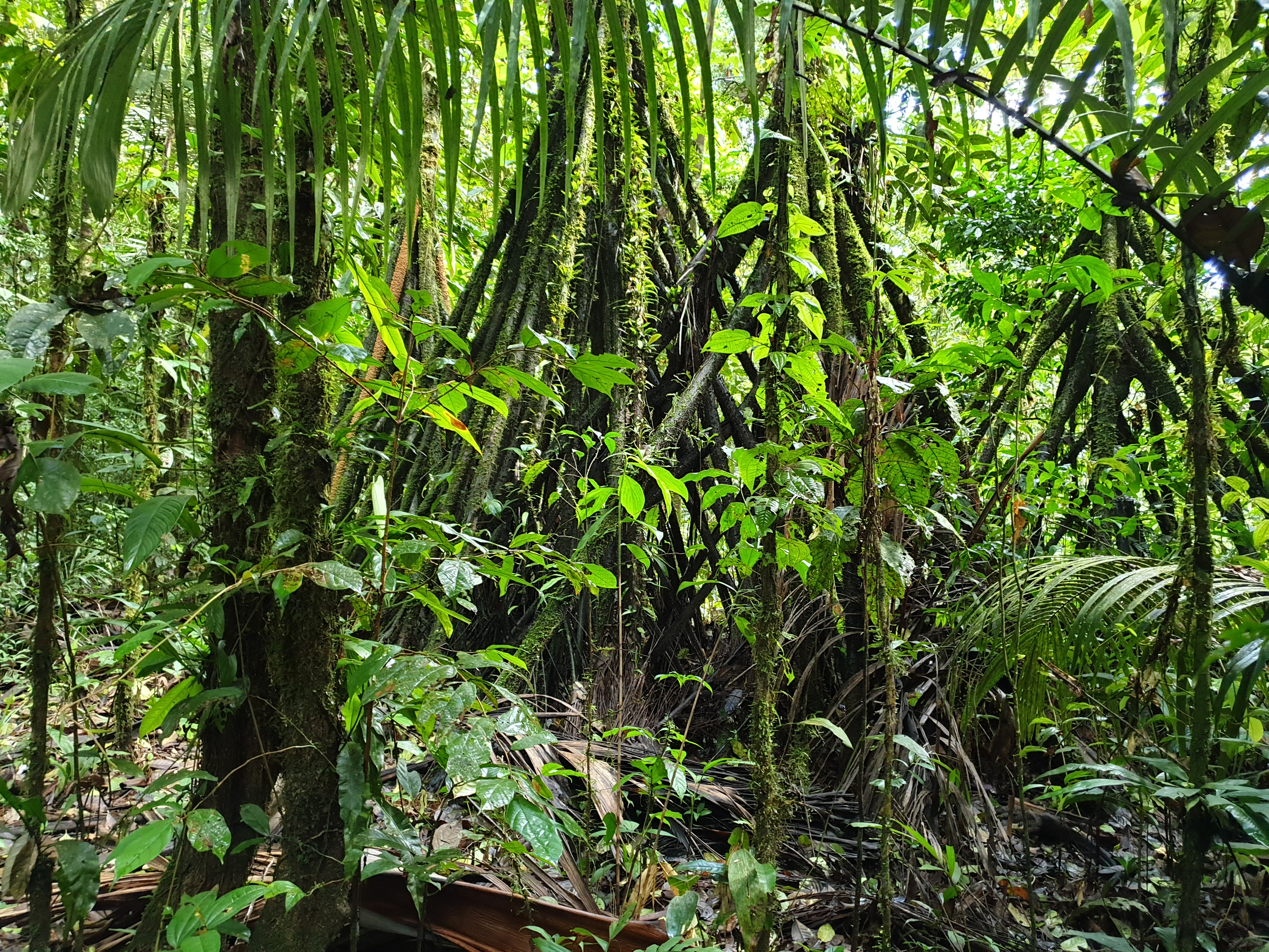 Esta fotografía fue tomada en un área protegida de Colombia con el código Amazone del RUNAP.